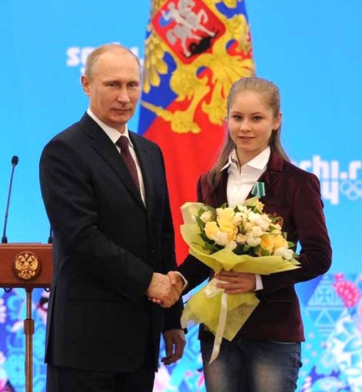 Орденом Дружбы награждена олимпийская чемпионка в фигурном катании Юлия Липницкая.